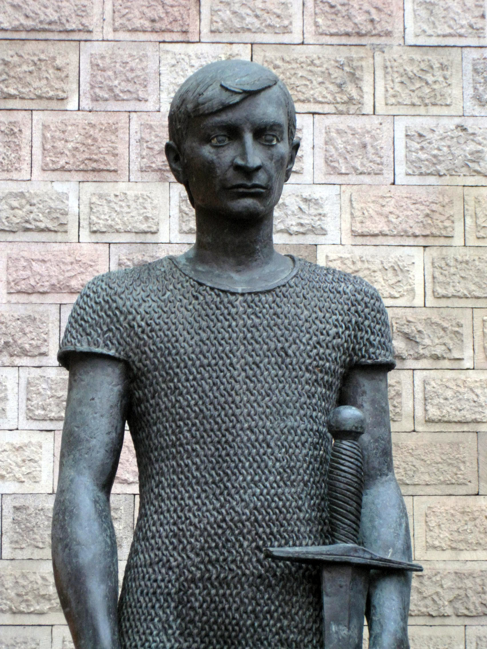 Sant Jordi (Joan Rebull). Rambla Catalunya amb av. Diagonal (Barcelona)